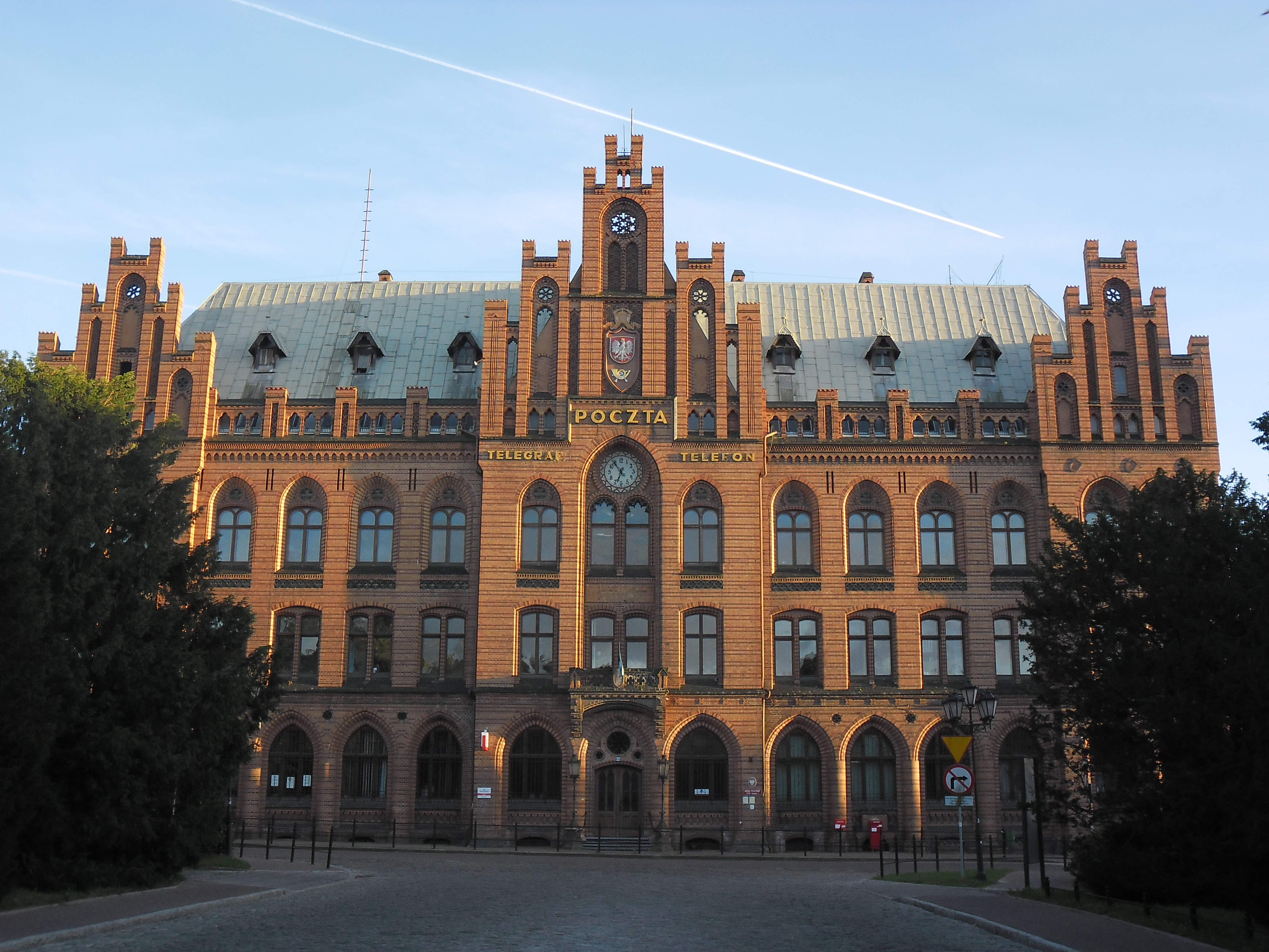 Koszalin, ul. Lampego 22 Widok z przodu pokazujący wyjątkowośc tego budynku .